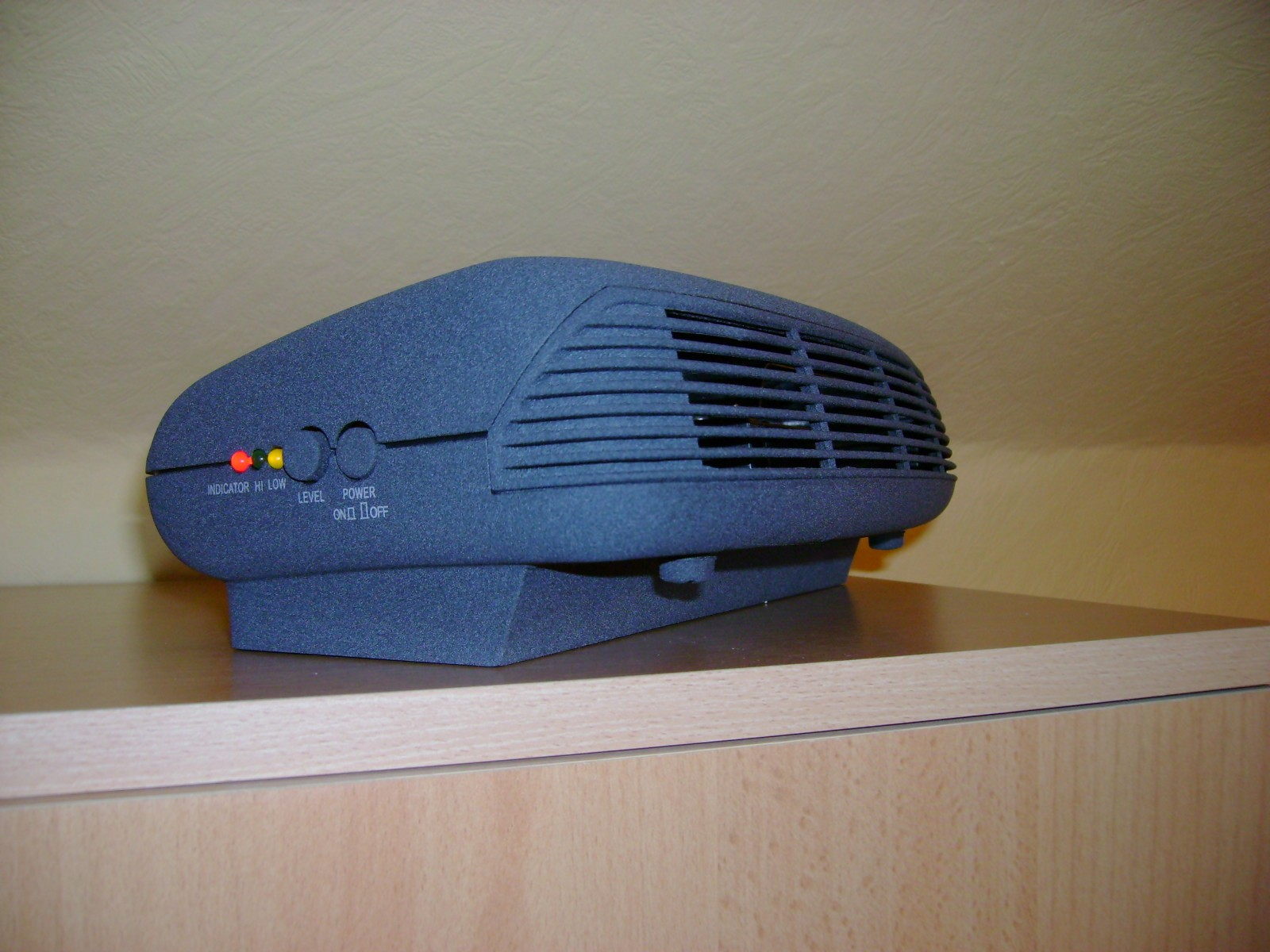 Modern, formatervezett ionizátor működés közben